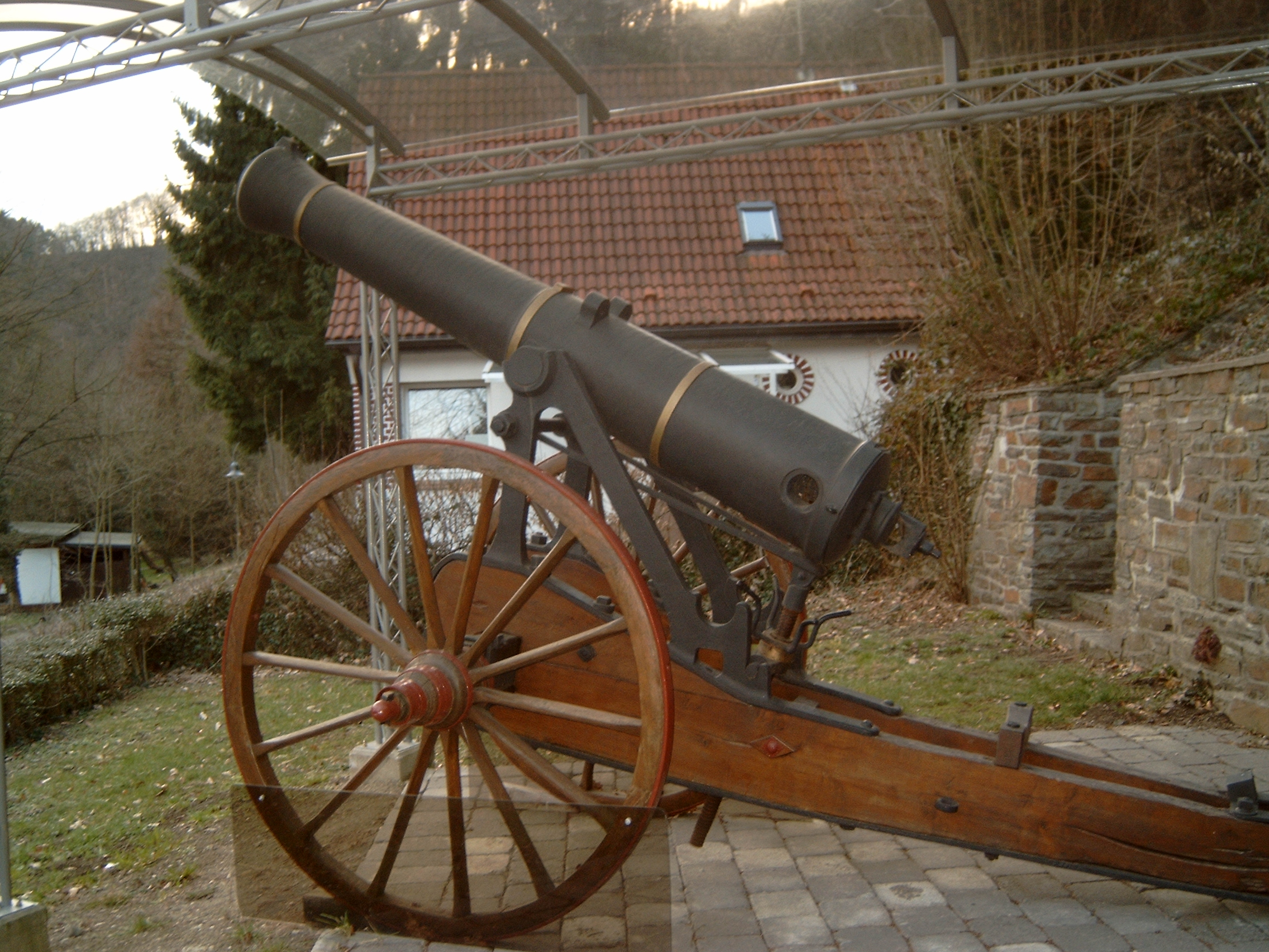 Eine der beiden Kölner Kanonen aus dem dt.-frz. Krieg